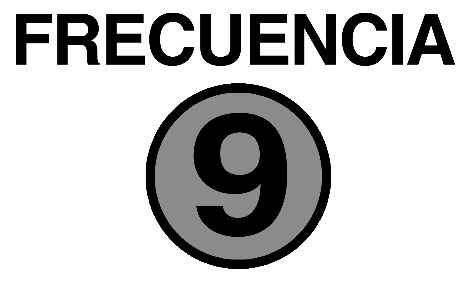 Emblema de Frecuencia 9, nombre que recibió la segunda señal de TVN entre 1986 y 1987.